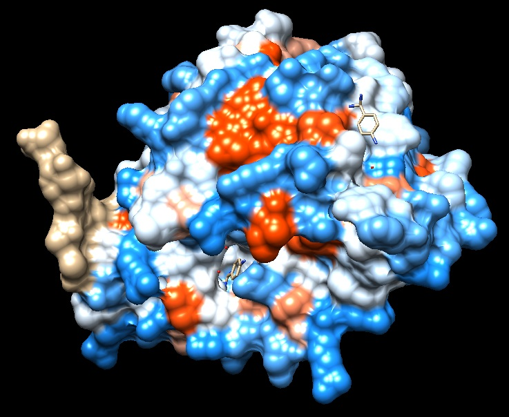 Estructura hidrofòbica acrosina